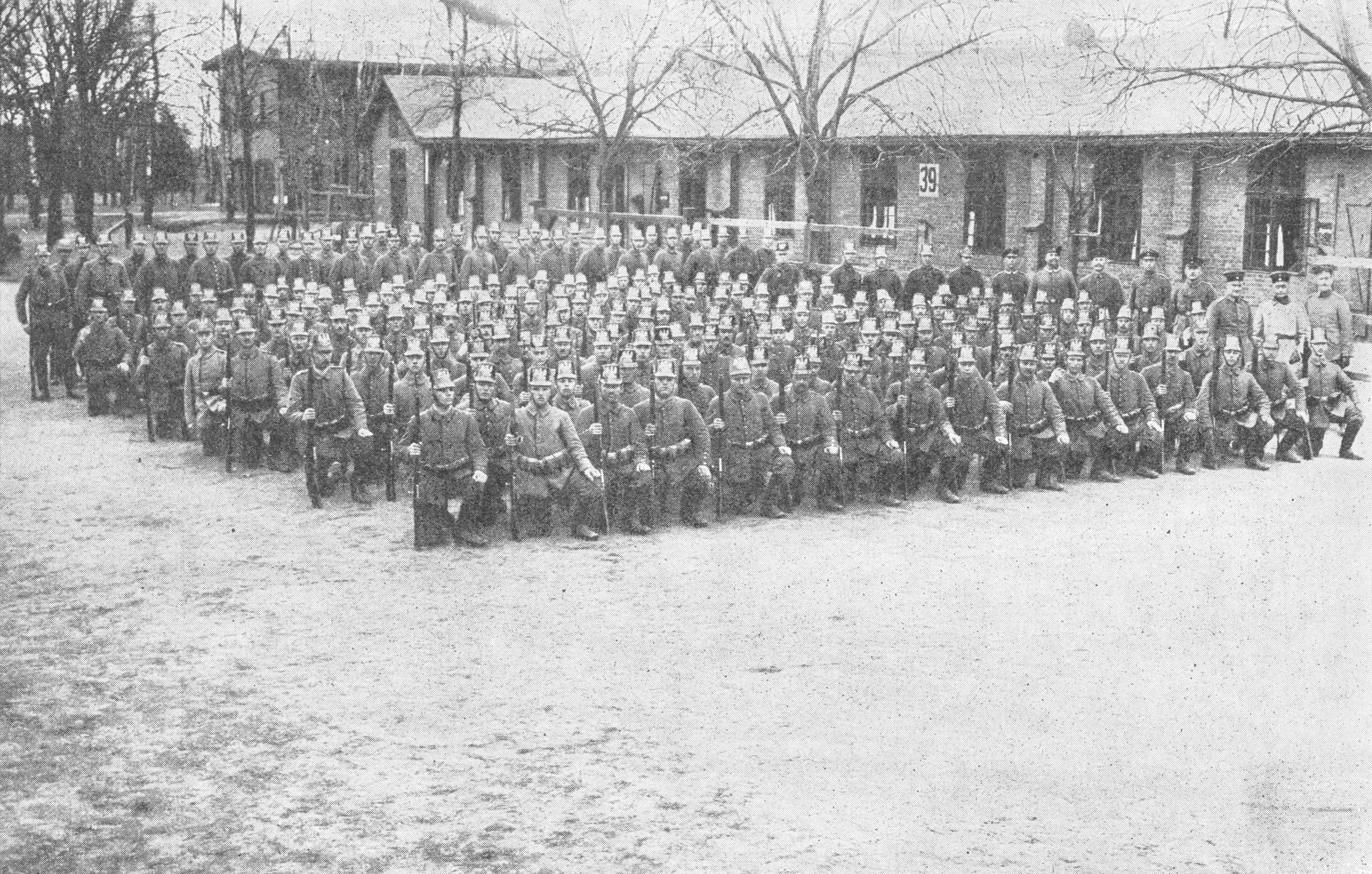 Description